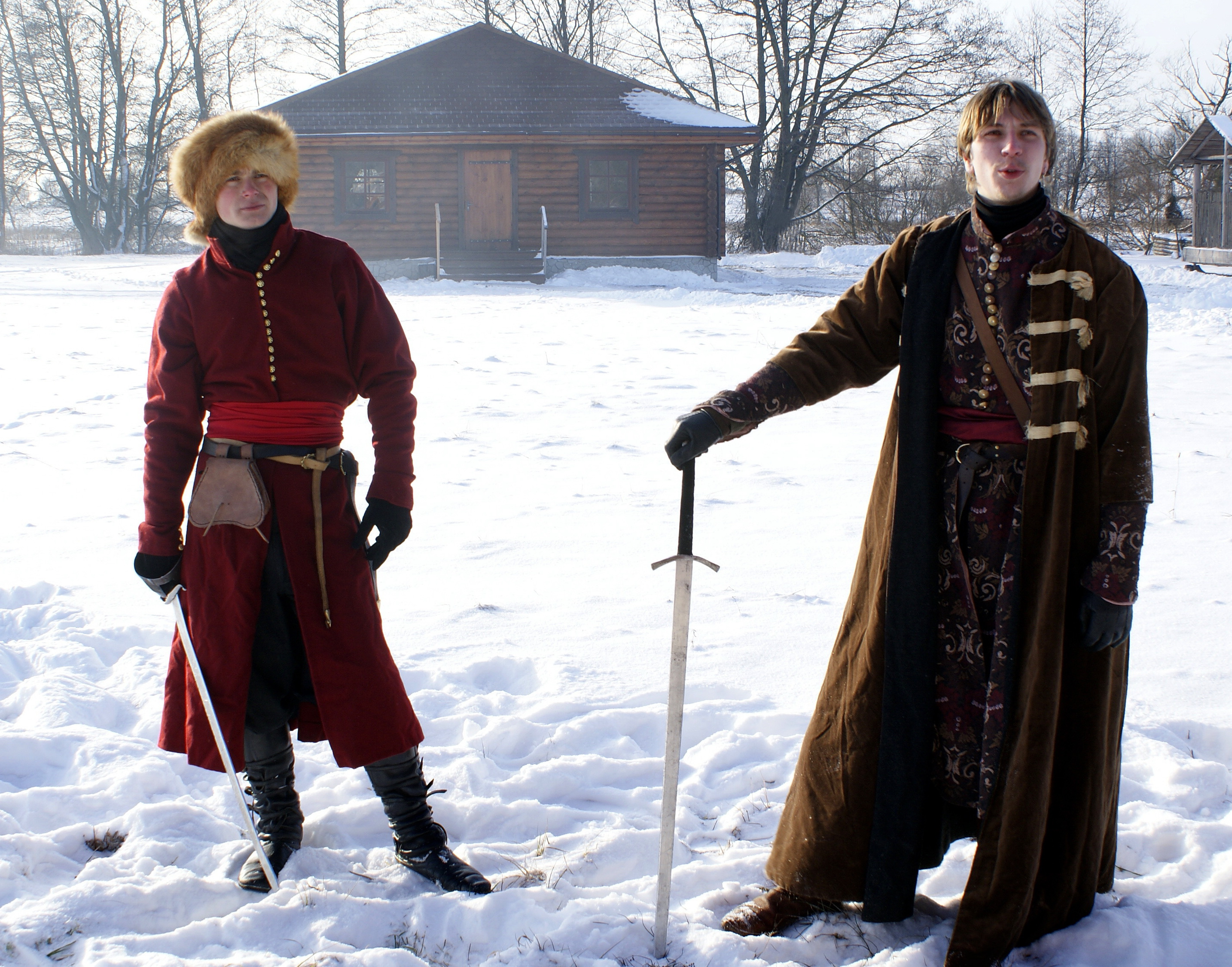 Беларуская (тарашкевіца): Анімацыя праграма ў Дудутках "Панскія забабоны"